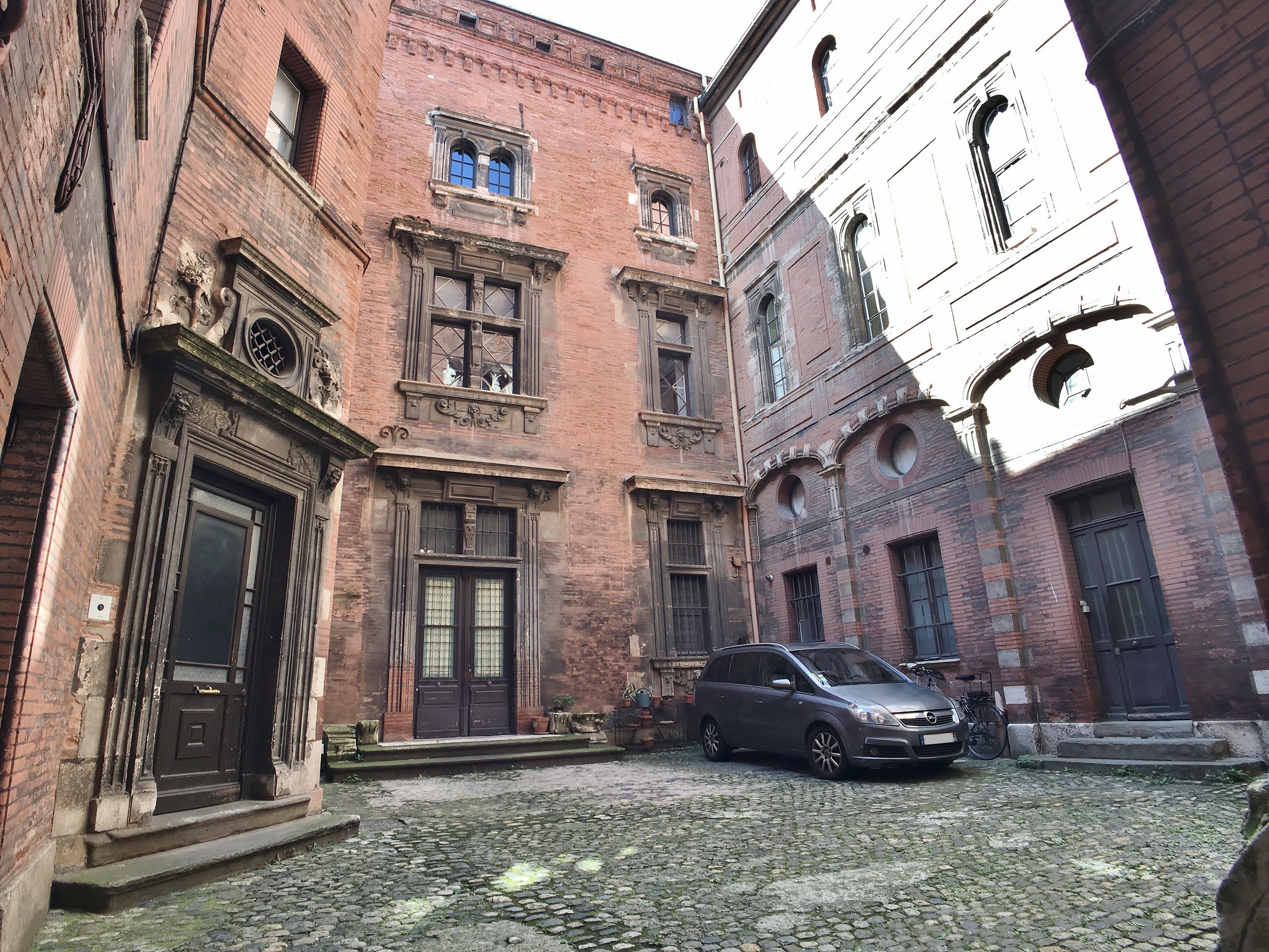 La cour de l'hôtel de Massas (ou d'Aldéguier), 16ème siècle, Toulouse.